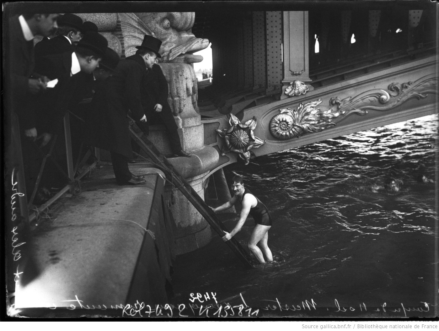 Coupe de Noël à Paris : le vainqueur Gérard Meister à l'arrivée de cette compétition de natation dans la Seine, au pont Alexandre-III le 25 décembre 1909.